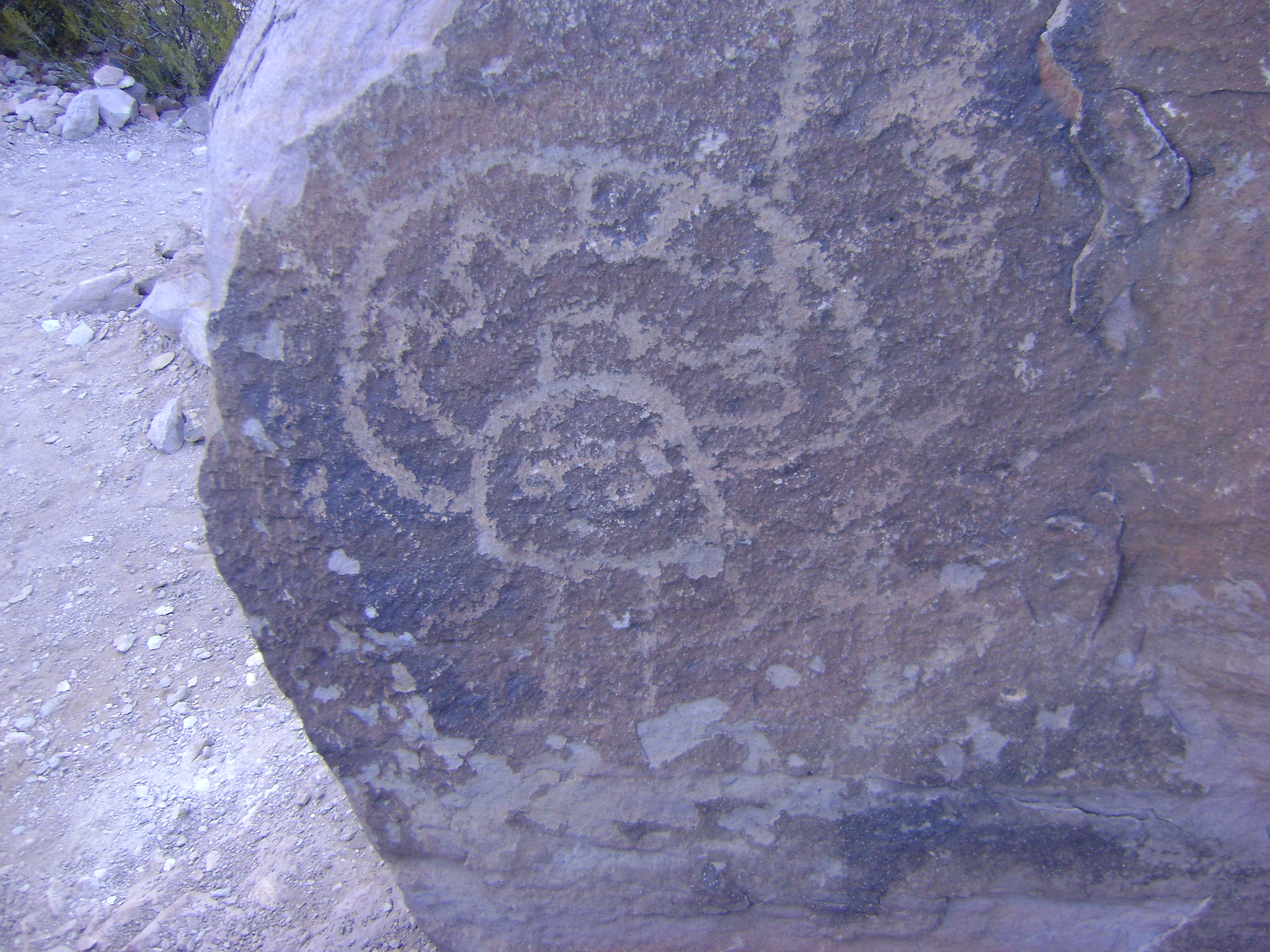 Petroglifo que puede encontrarse en el cerro Tunduqueral de Uspallata